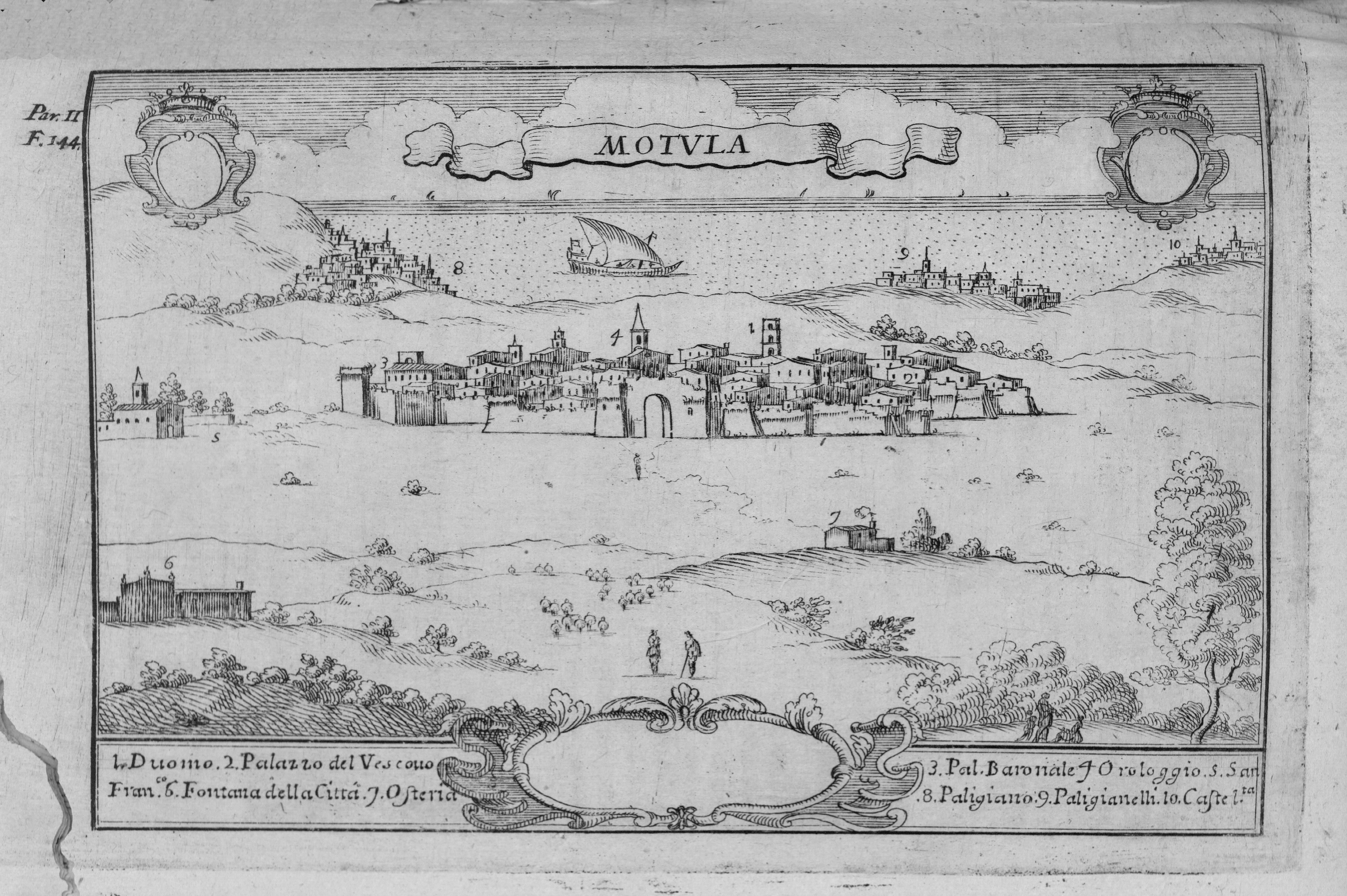 Autor: Pacichelli, Giovanni Battista, 1641-1702 Descripción bibliográfica: Il regno di Napoli in prospettiva : diviso in dodeci provincie, in cui si descrivono la sua Metropoli Fidelissima città di Napoli ... Opera postuma divisa in tre parti / dell'abatte Gio. Battista Pacichelli ; Parte prima [-terza] ... Del regno di Napoli in prospettiva / dell'abate Pacichelli. Parte prima. - In Napoli : nella Stamperia di Michele Luigi Mutio, 1703. - v. : principalmente il.; 4º . - Inic. adorn. y frisos dec. - Grab. calc. y h. pleg. grab. calc. de mapas de Cassianus de Silva. Ilustrador: Cassiano De Silva, Francesco, il. Impresor: Muzio, Michele Luigi, imp. Lugar de impresión: Italia. Nápoles Localización: Vea la ilustración en su contexto